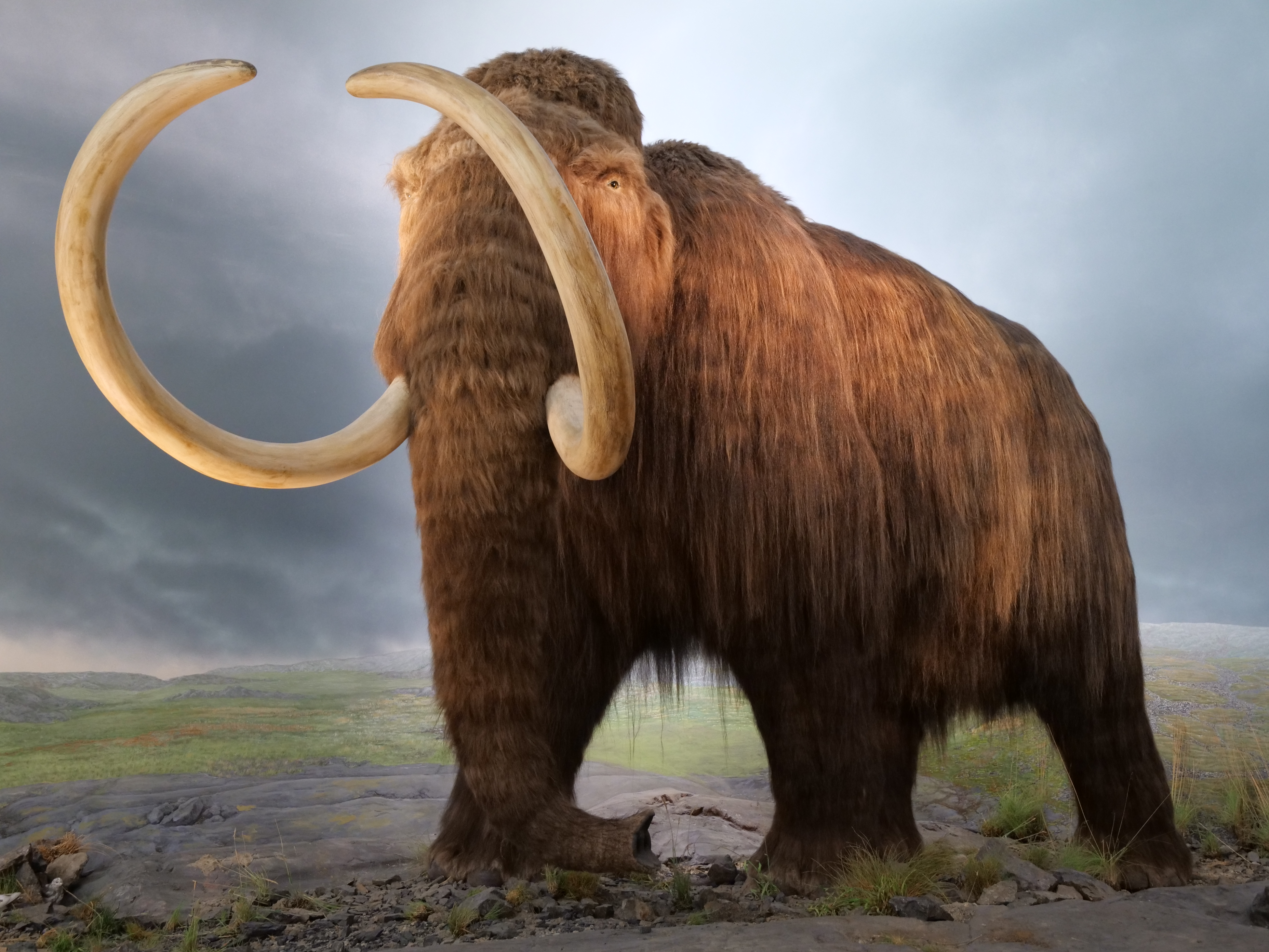 Model of Mammuthus primigenus in the Royal British Columbia Museum in Victoria, Vancouver Island